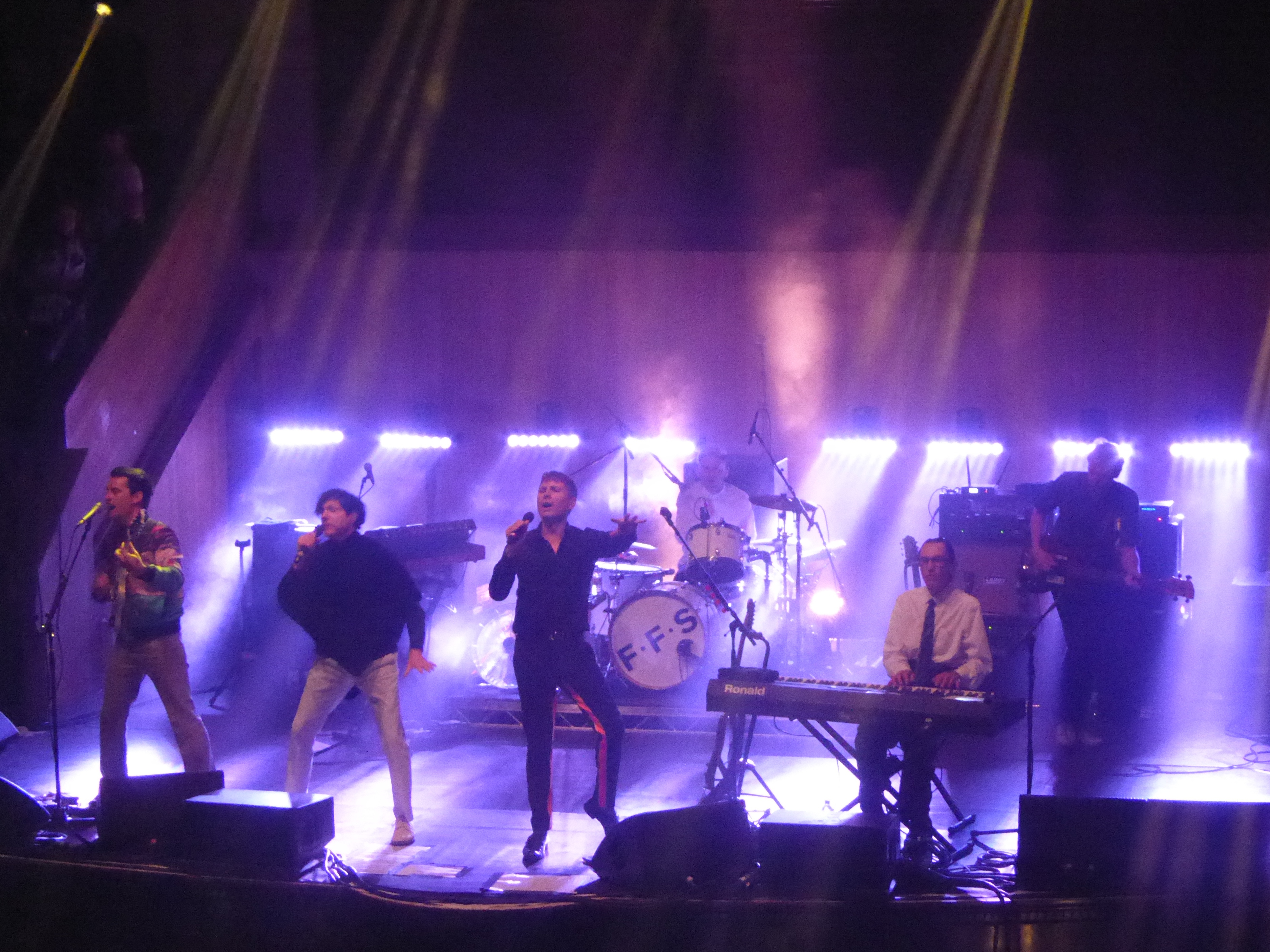 FFS (Franz Ferdinand & Sparks) @ Albert Hall, Manchester 25/8/2015